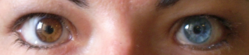 Unterschiedliche Augenfarbe einer Frau